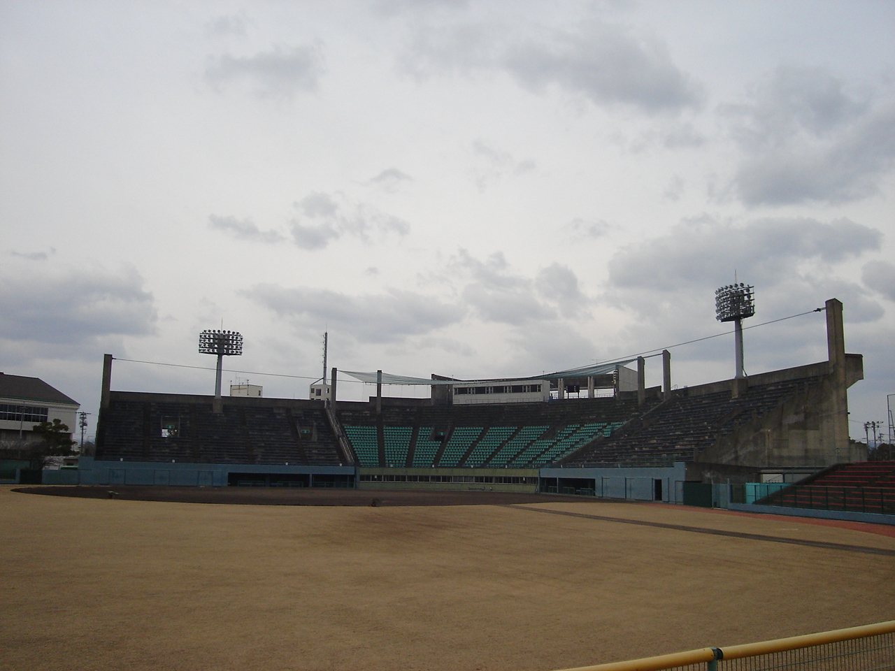 徳島県営蔵本球場。 - 日本国徳島県徳島市にある野球場。